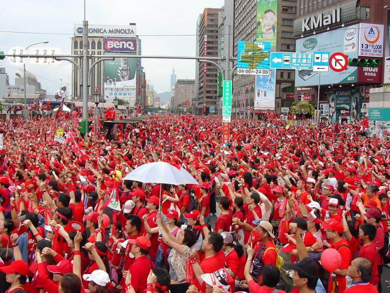 臺北市中正區忠孝西路一段天下圍攻